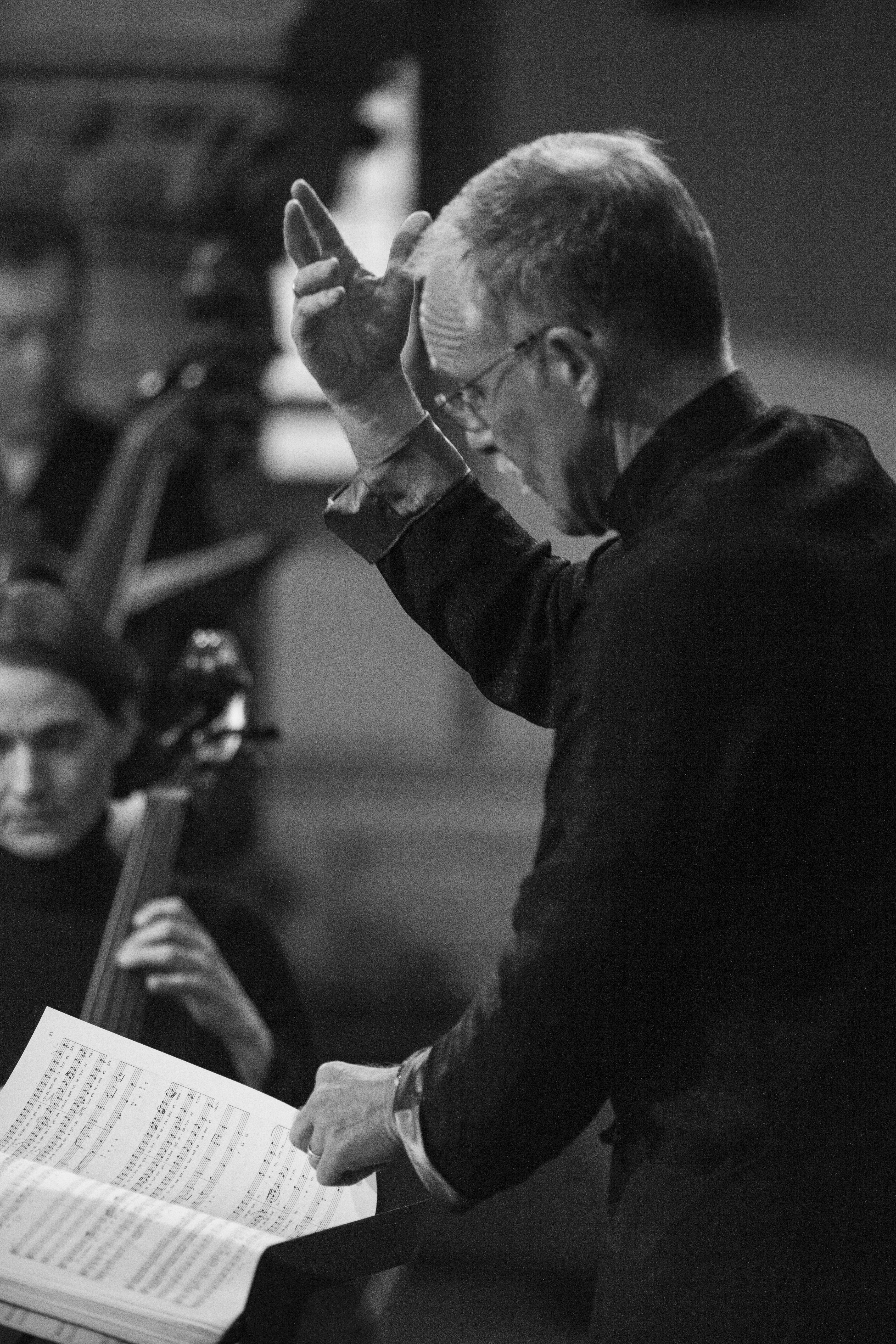 Der Chorleiter und Dirigent Kristian Commichau beim Dirigieren.